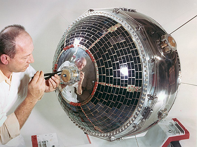 Explorer 32 aeronomy satellite